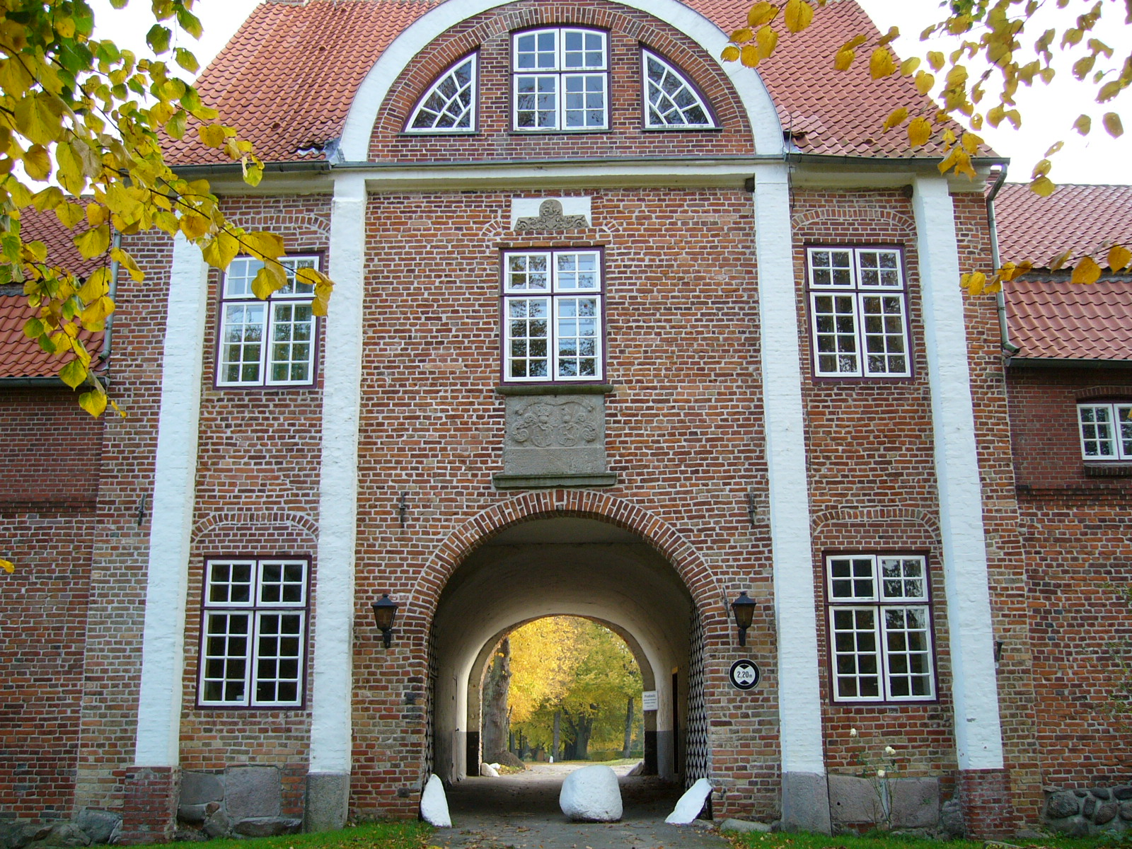 Torhaus des Gutes Quarnbek bei Kiel. Die dargestellte Durchfahrt des riesigen Torhauses stammt aus dem Jahr 1673.